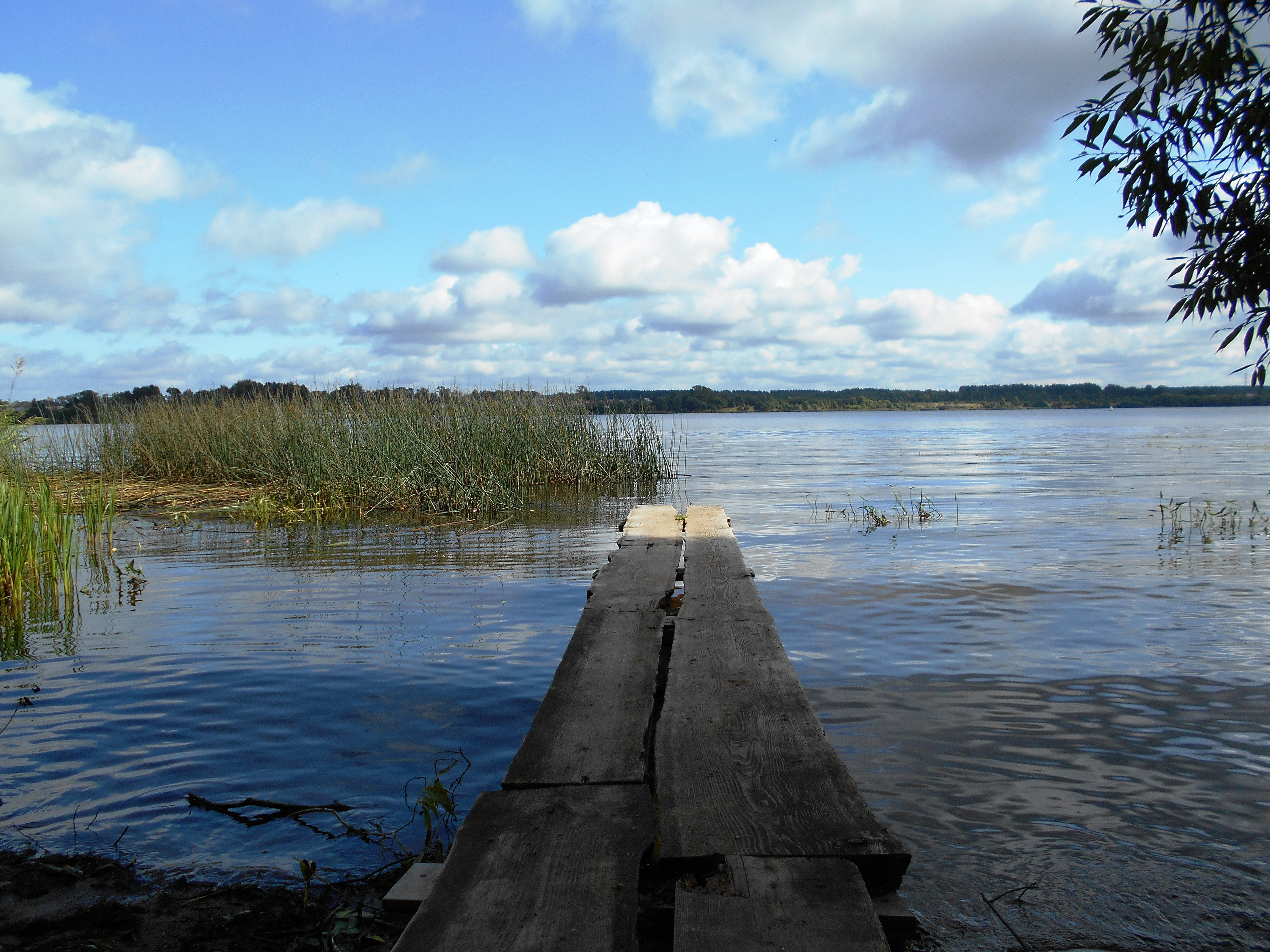 Река Жабня на территории г. Калязин примерно за 350 метров до устья